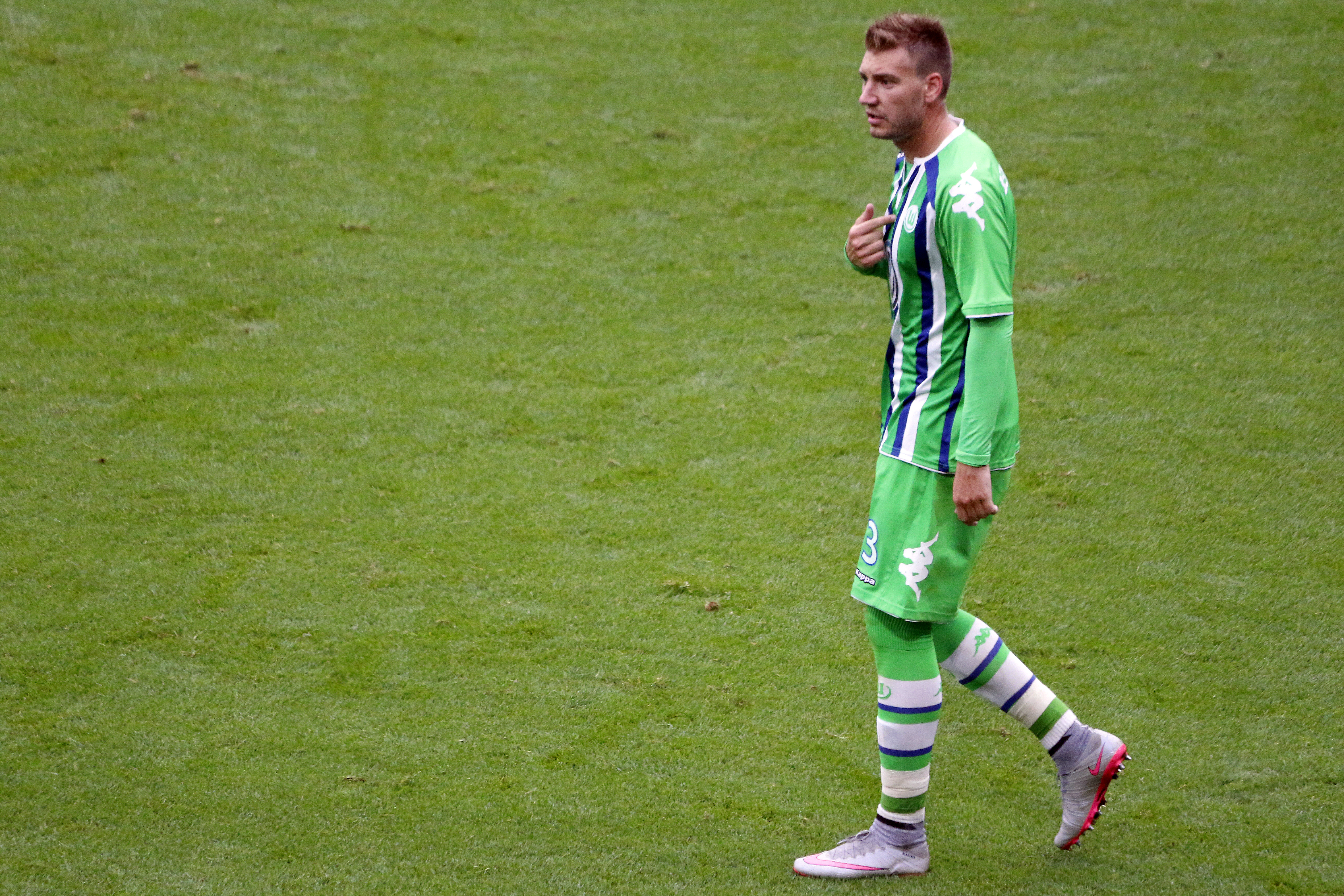 Emirates Cup 2015, Emirates Stadium